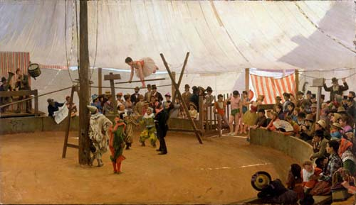 Giovanni Battista Quadrone, Il circo(o I saltimbanchi), 1894. Olio su tavola.